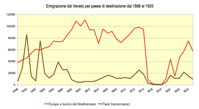 Il grafico evidenzia l'emigrazione dal Veneto tra il 1886 al 1925 verso altri paesi europei e in paesi transoceanici. I dati sono presi dall'allegato al giornale L'Arena per i 140° dalla fondazione.